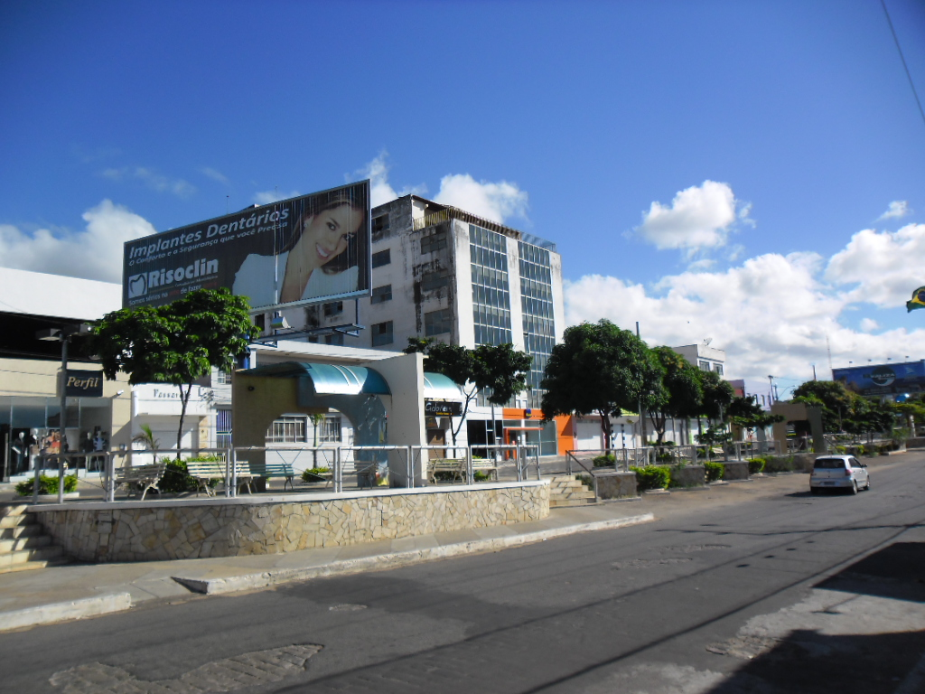 Praça Armindo Azevedo. No fundo, o edifícil da agência Itaú.